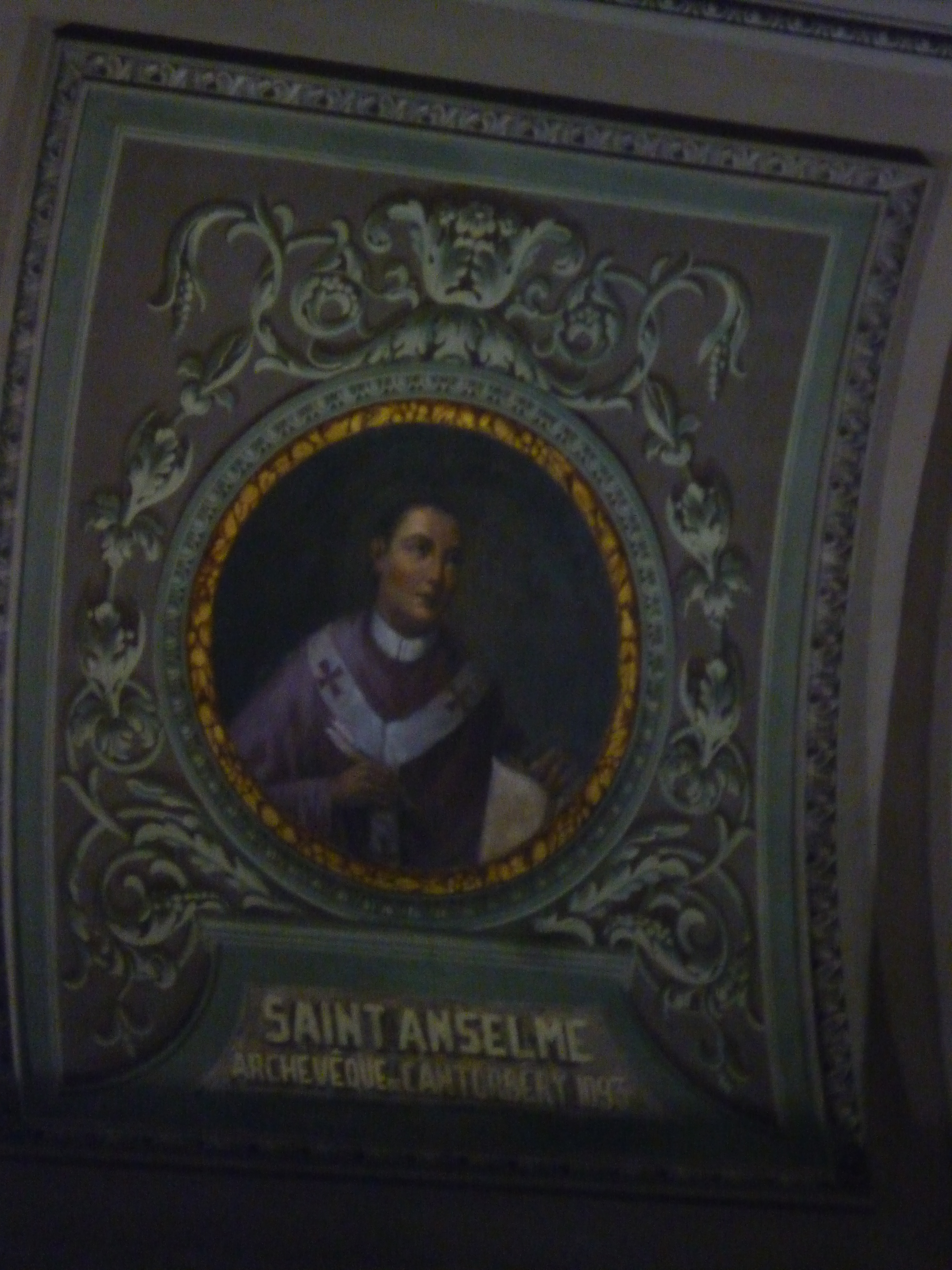 Le portrait de Saint Anselme dans le Salon ducal de l'Hôtel-de-Ville à Aoste